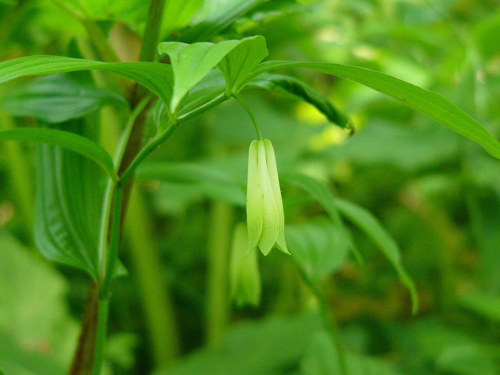 Disporum sessile